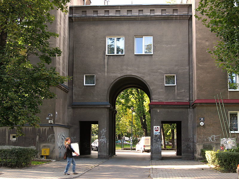 Nowa Huta osiedle Szkolne - Brama